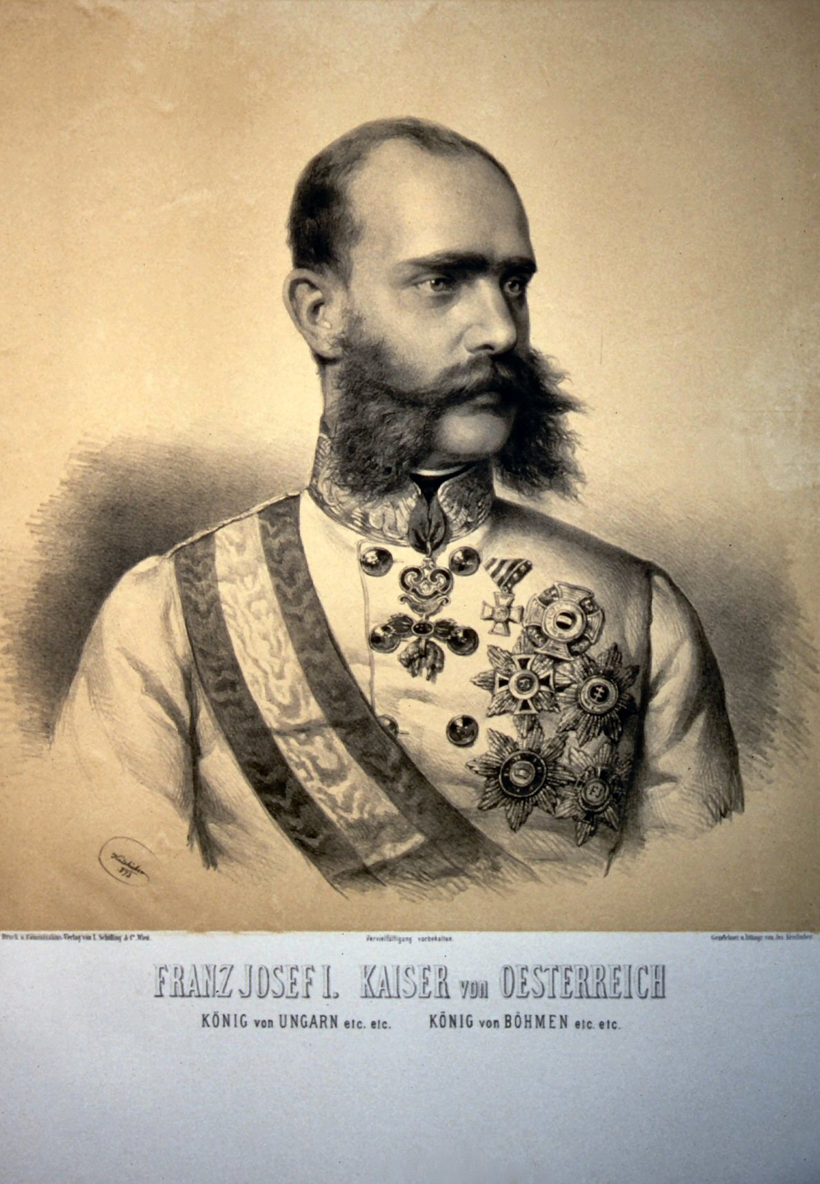 Franz Josef I. (1830-1916), Kaiser von Österreich, König von Ungarn.